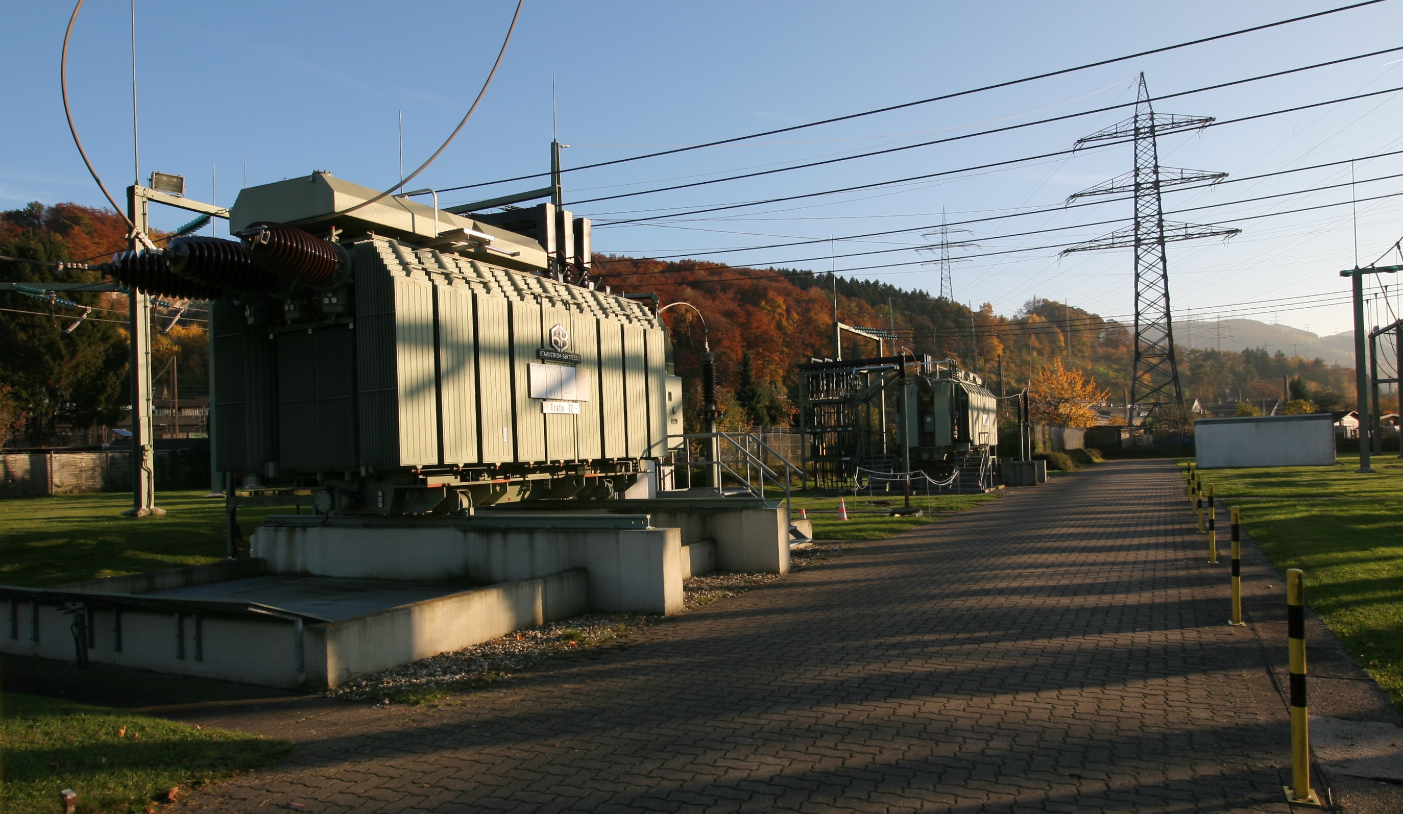 Umspannwerk Genna in Iserlohn, Zum Laurenzisbrunnen/Gennaer Straße; rechts Mast der 110-kV-Leitung Ronsdorf–Genna (Bl. 2306 M143, ehem. 220 kV)